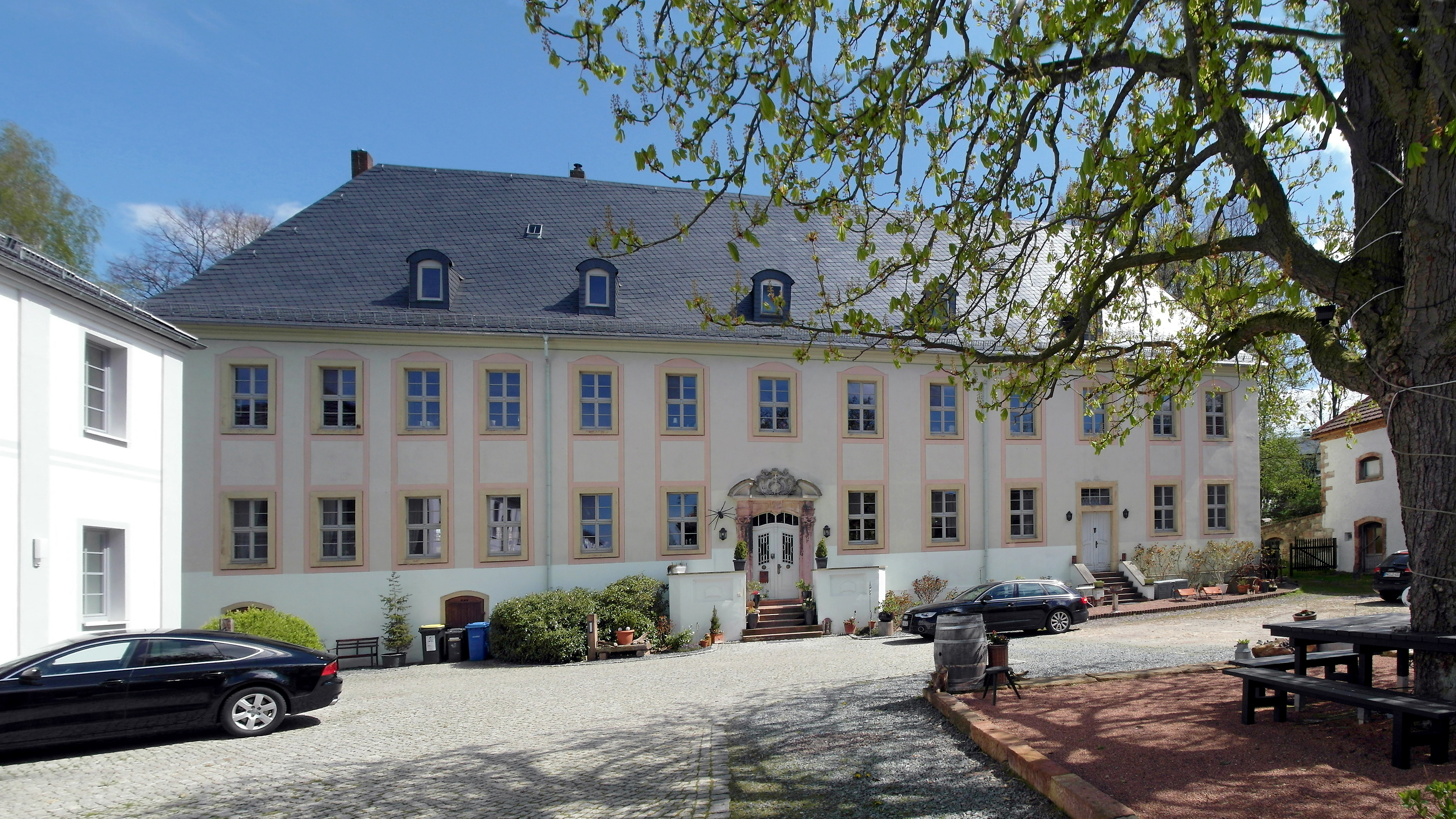 24.04.2017 09243 Mittelfrohna (Niederfrohna) Obere Hauptstraße 1: Rittergut Mittelfrohna (GMP: 50.879100,12.744841). Das Herrenhaus wurde 1772-1774 für Johann Christoph und Johann Gottlieb Siegert erbaut, worauf im Portalschlußstein die Buchstaben JCGS und die Jahreszahl 1774 hinweisen. Heute Wohnhaus in Privatbesitz. [SAM9465+9467.JPG]20170424200MDR.JPG(c)Blobelt